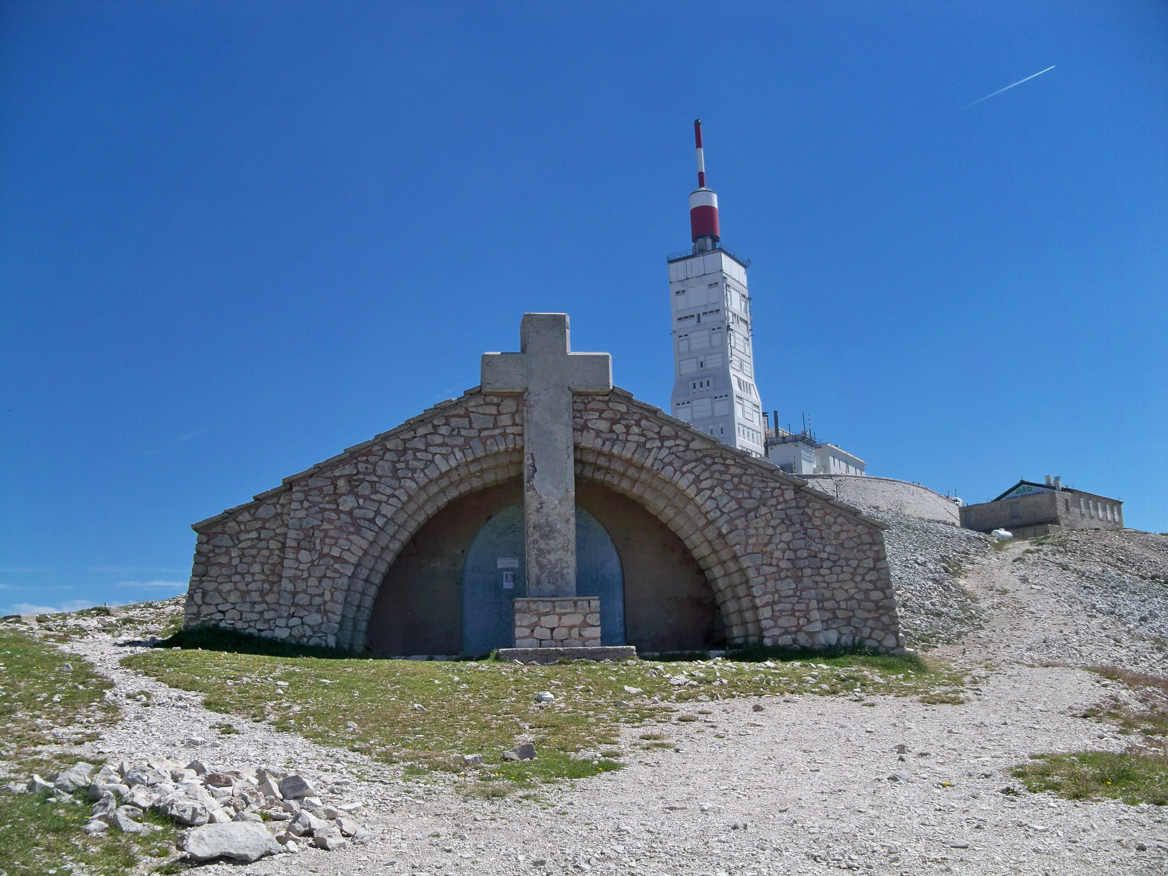 Chapelle Sainte Croix, au sommet du Mont Ventoux, Vaulcuse